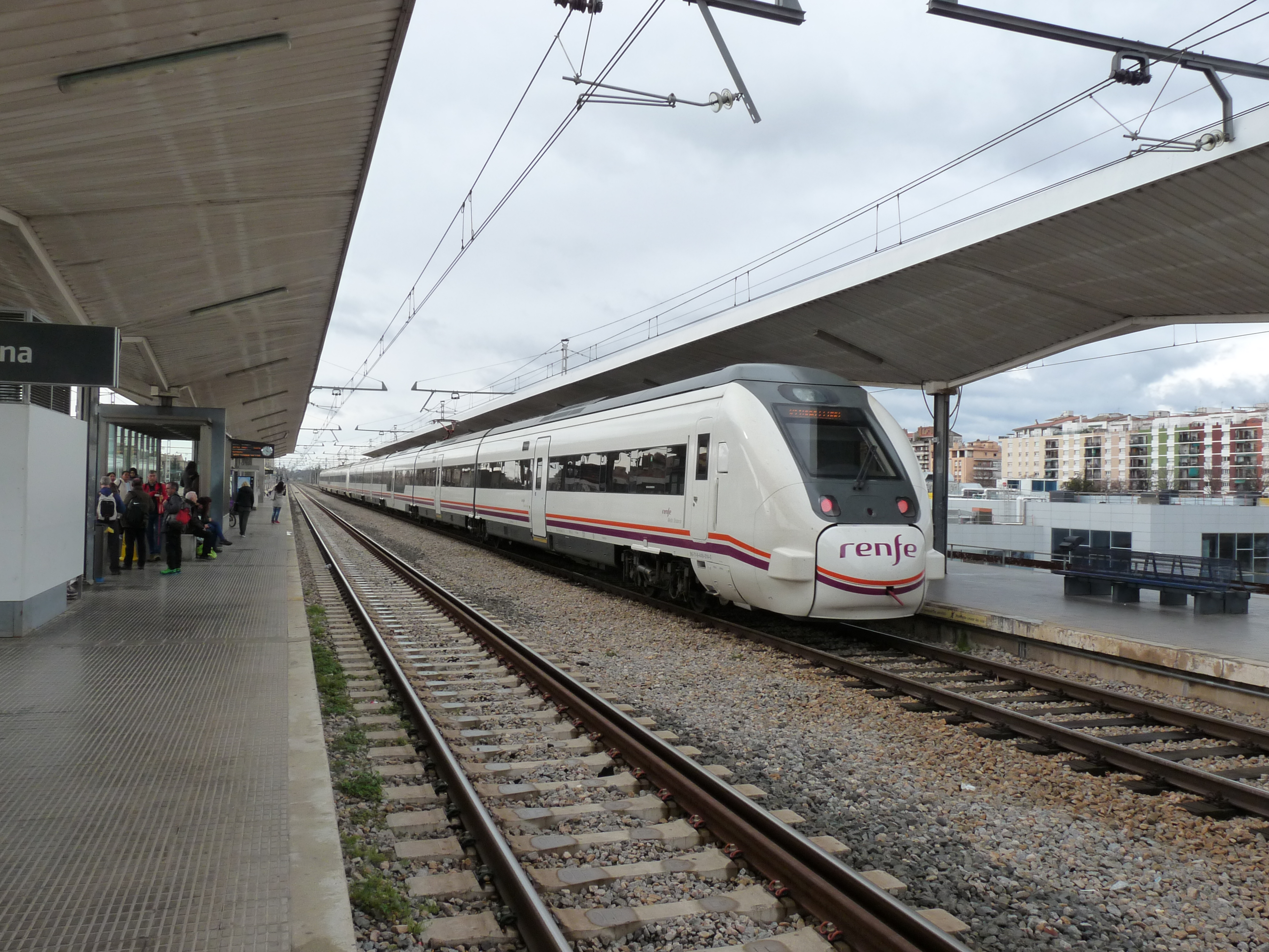 Girona station. Een Media Distancia trein naar Barcelona.